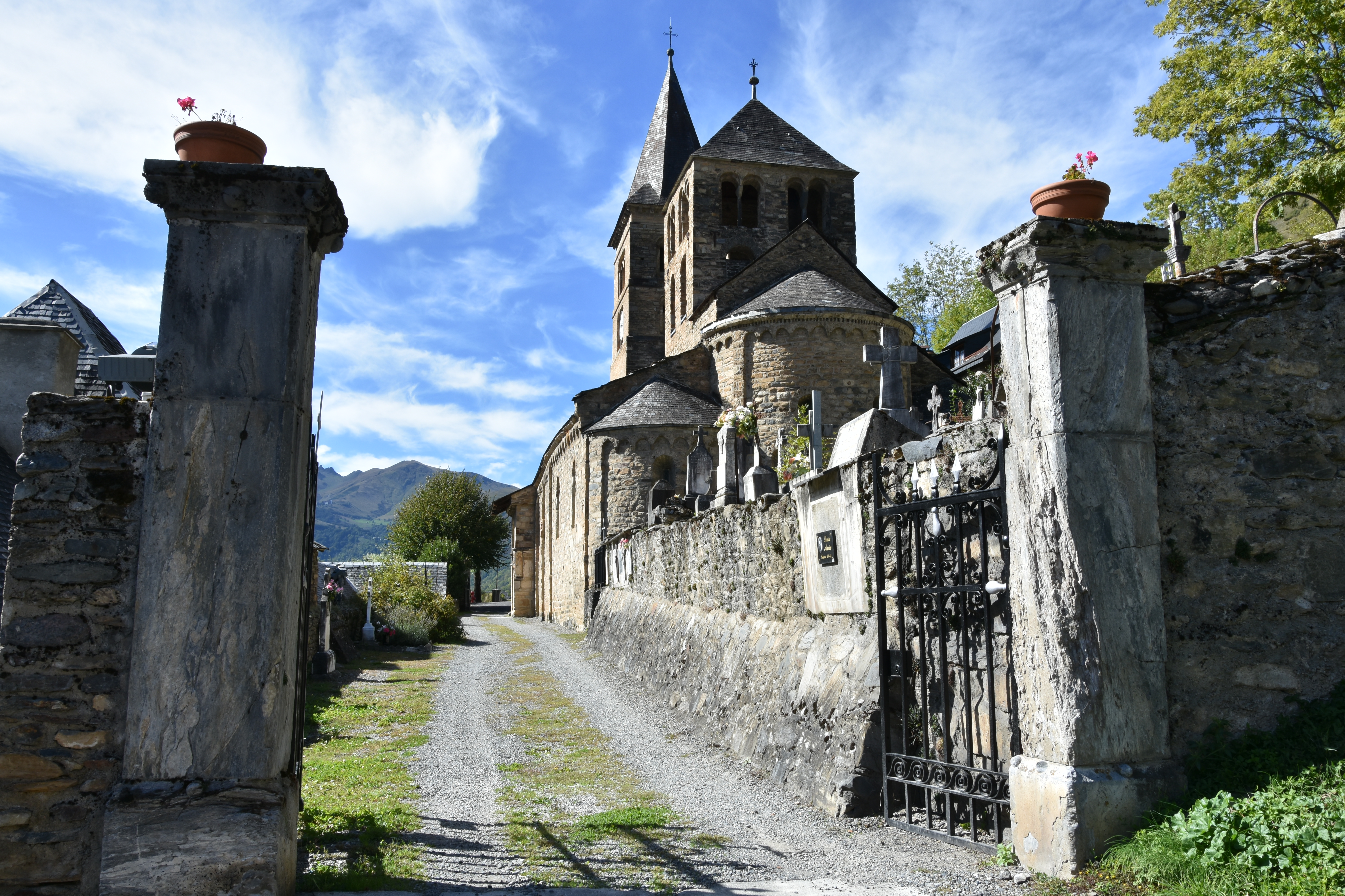 Église Saint-Aventin-de-Larboust de Saint-Aventin 7-10-2019 14-15-30